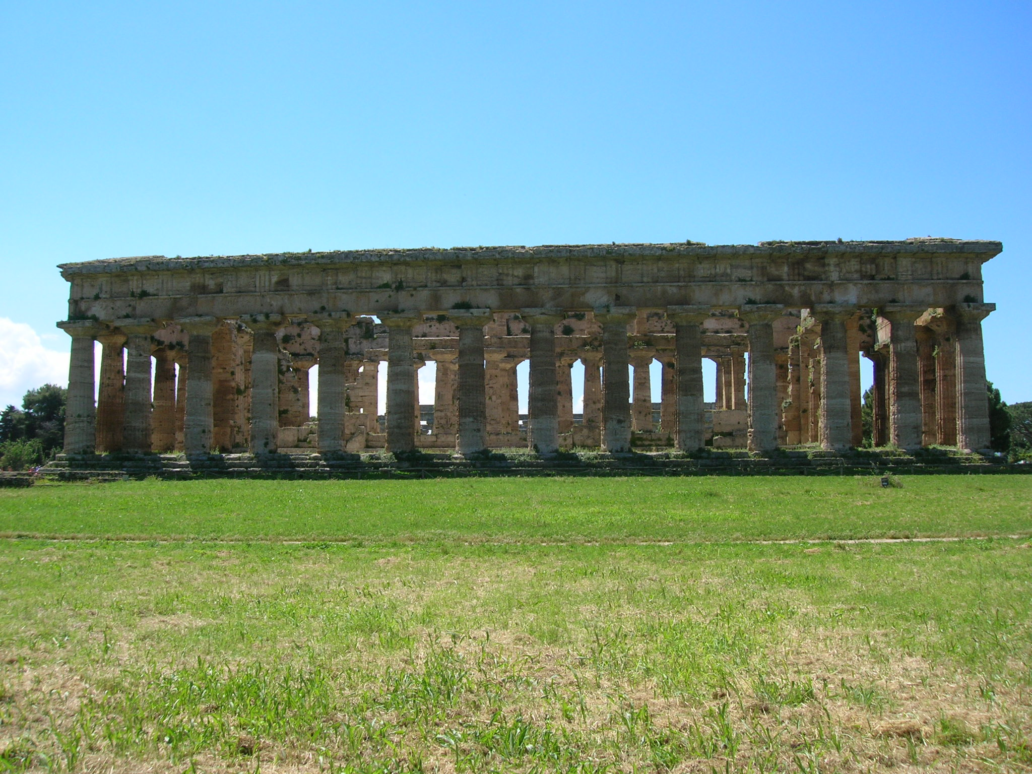 Area Archeologica di Paestum - MIBAC This is a photo of a monument which is part of cultural heritage of Italy.